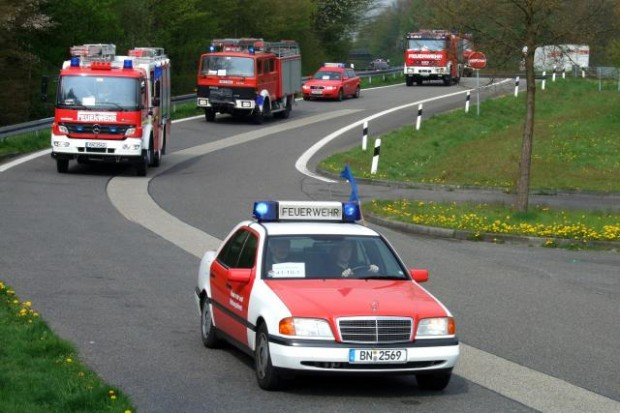 Marsch im geschlossenen Verband